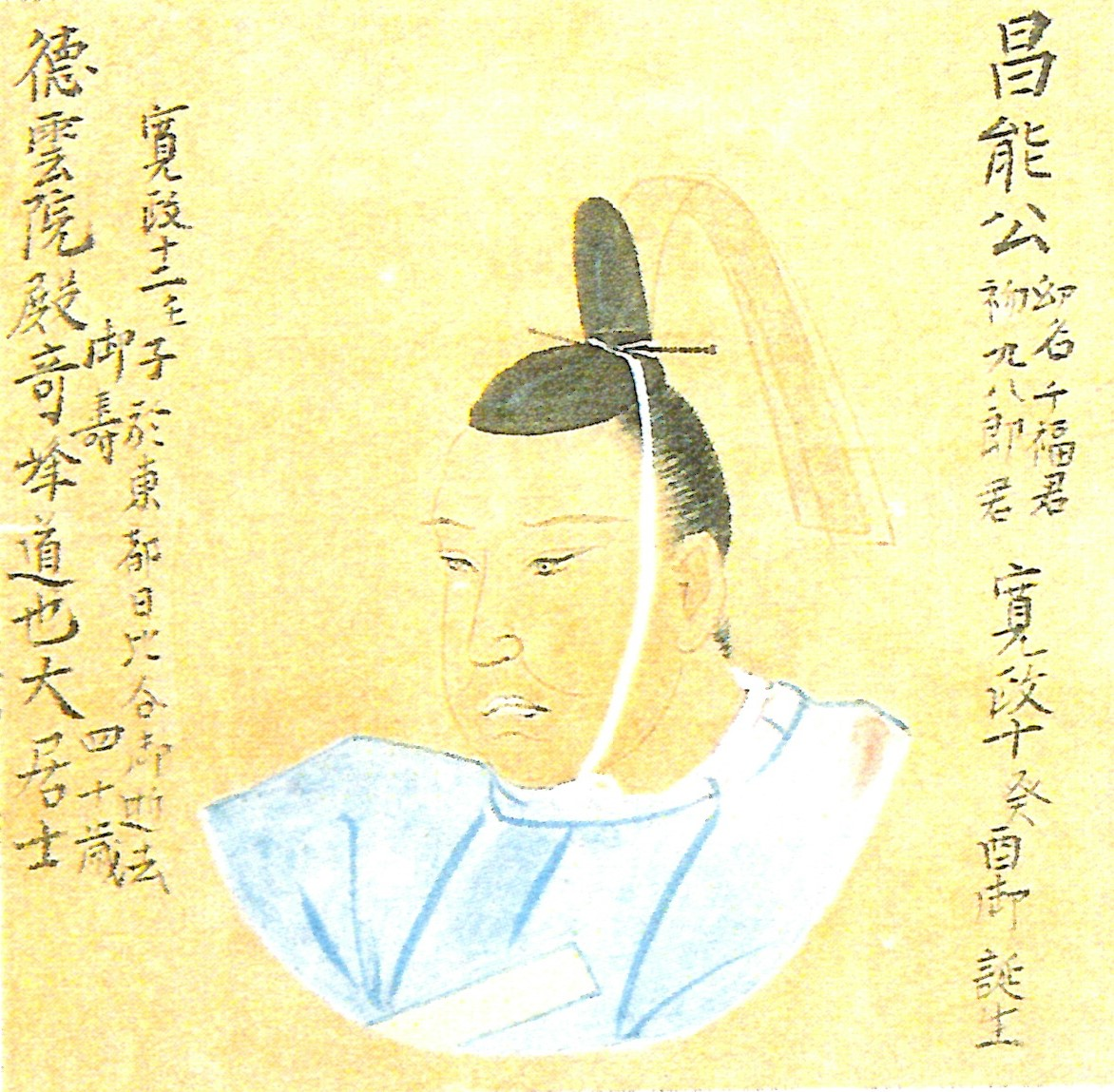 奥平昌能の肖像。